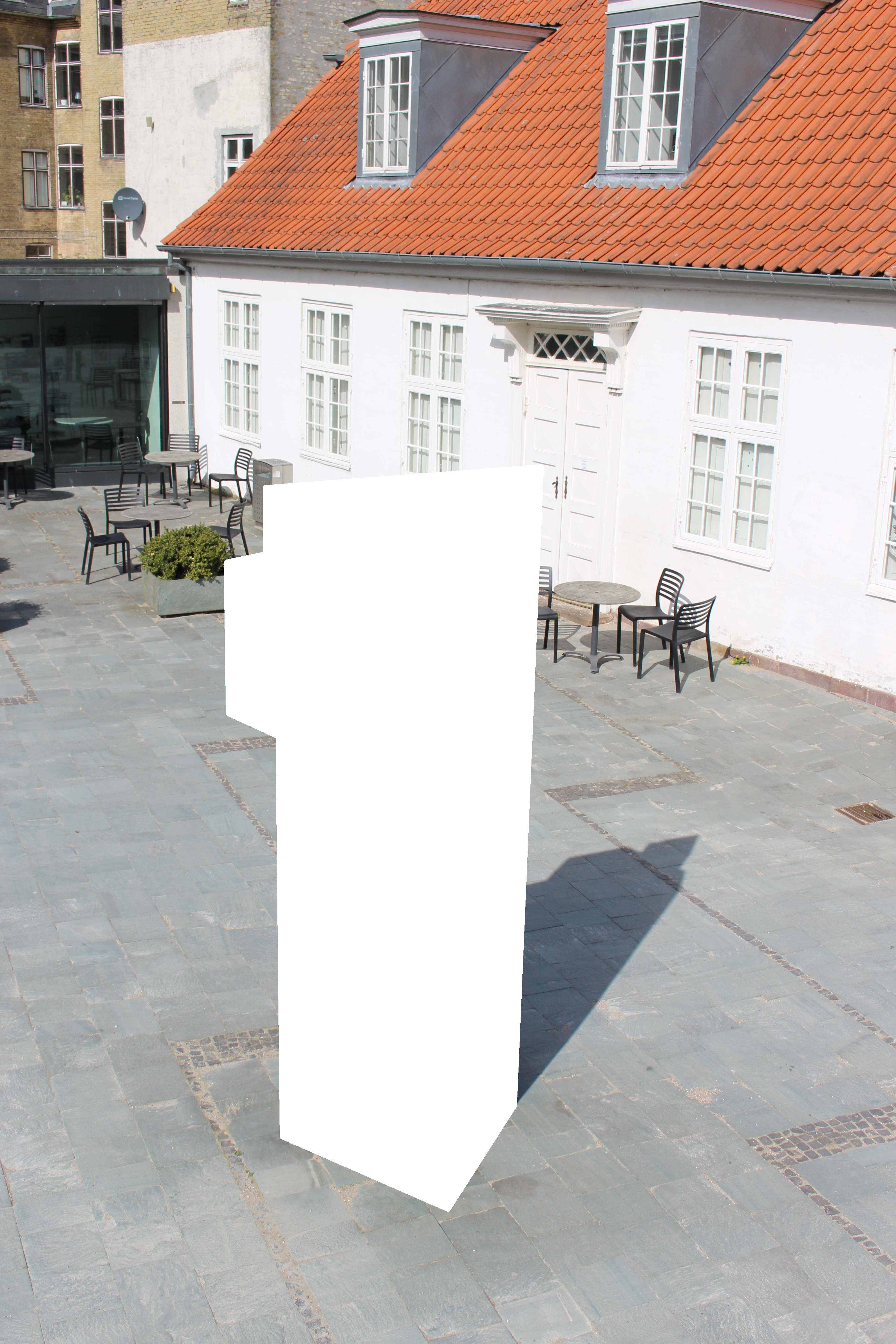 Foto af placeringen af Anita Jørgensens skulptur 'Søjlefigur med glasstak til Lyngby' ved Stadsbiblioteket i Lyngby, Kongens Lyngby, Danmark. Gramlille ses i baggrunden. Skulpturen er censureret som følge af ophavsret.